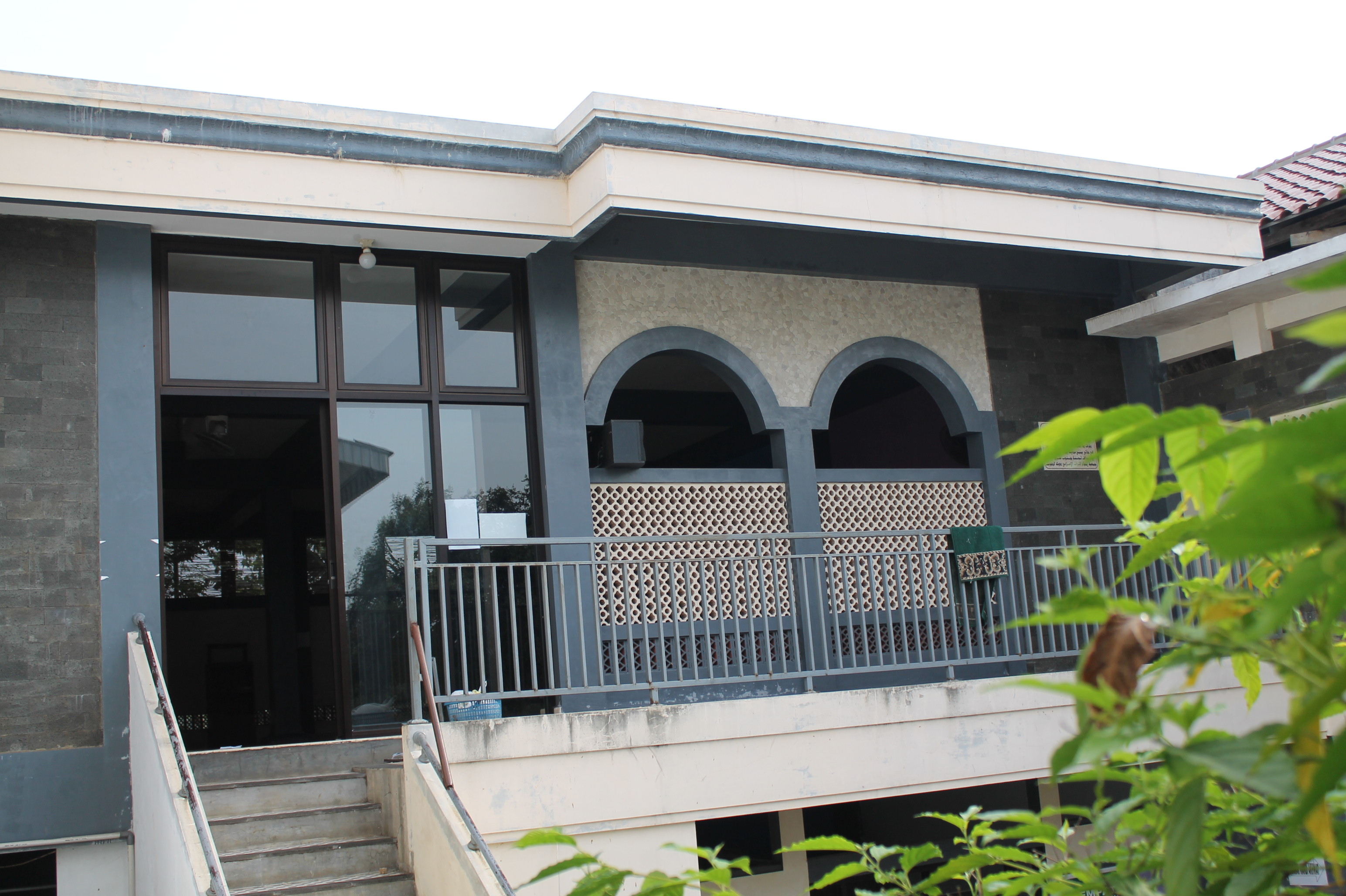 Masjid Tashfia SMP Tashfia Bekasi